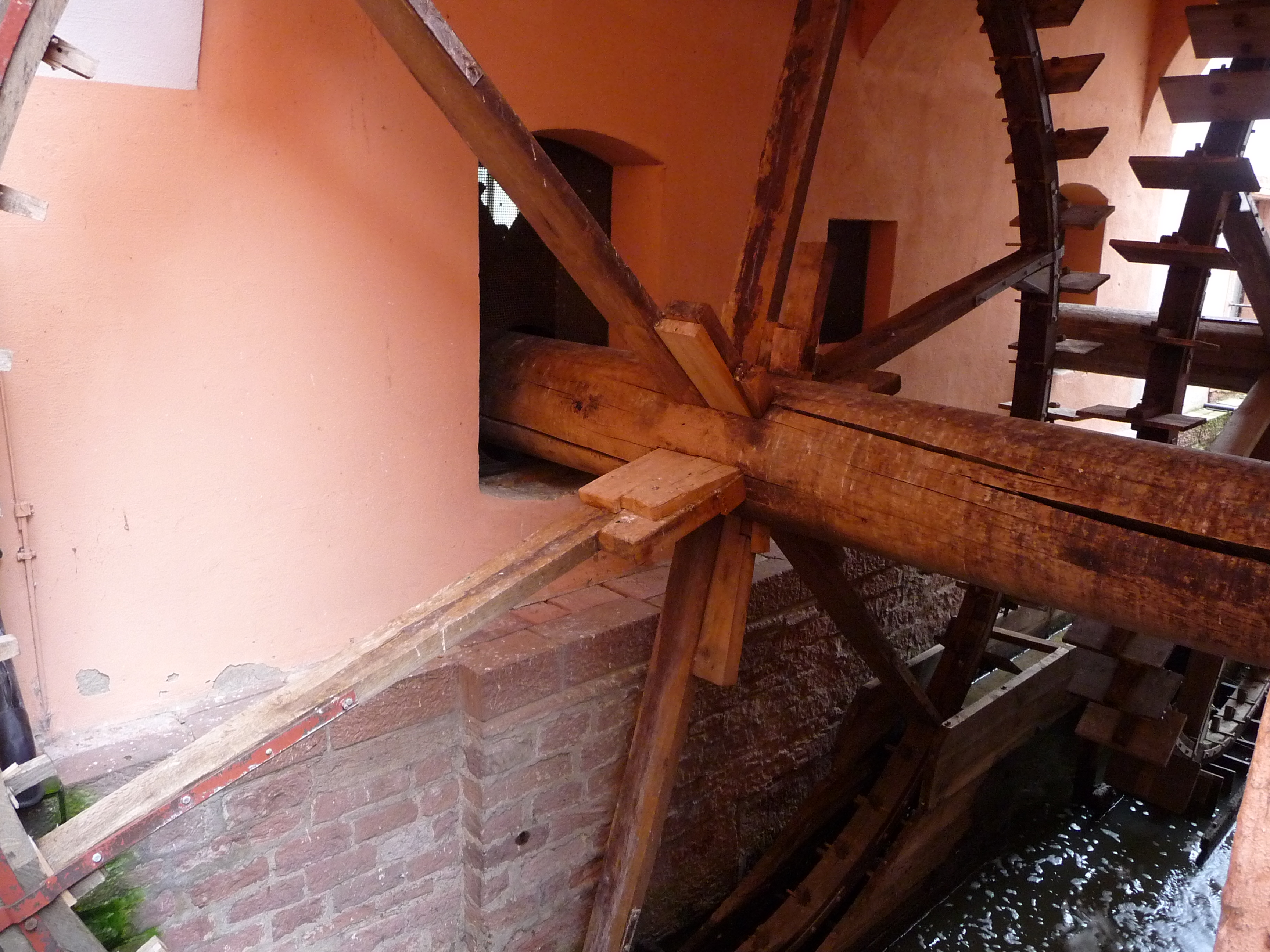 Mühlrad des Oberen Wasserwerks am Schwetzinger Schloss aus dem 18. Jahrhundert